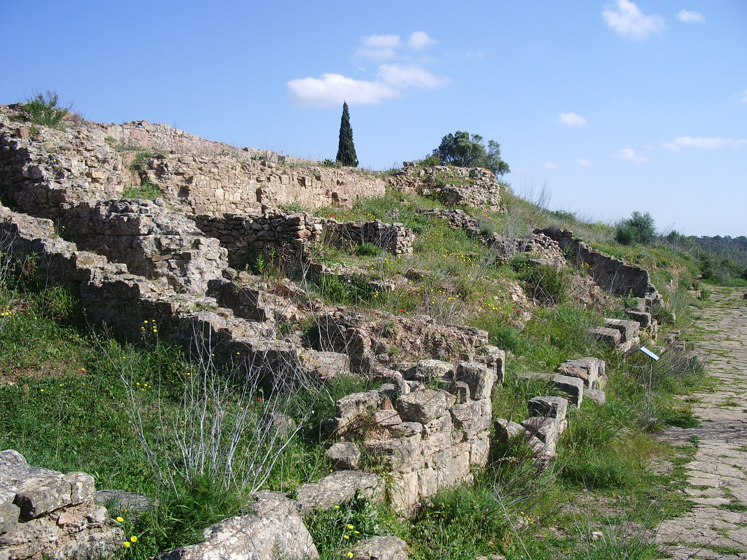 Reste von Läden in der Nähe des Forums